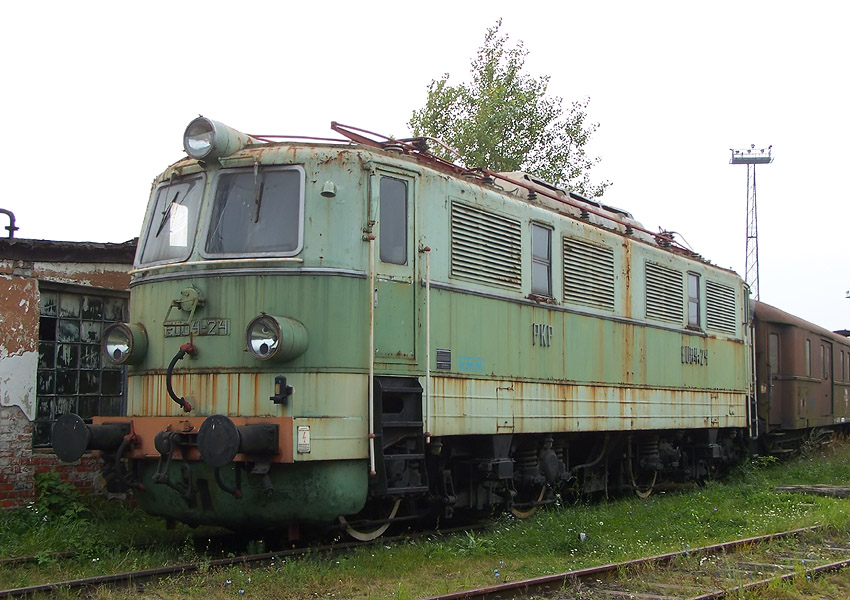 Lokomotywa EU04-24 stojąca w Muzeum Kolejnictwa i Przemysłu na Śląsku w Jaworzynie Śląskiej.